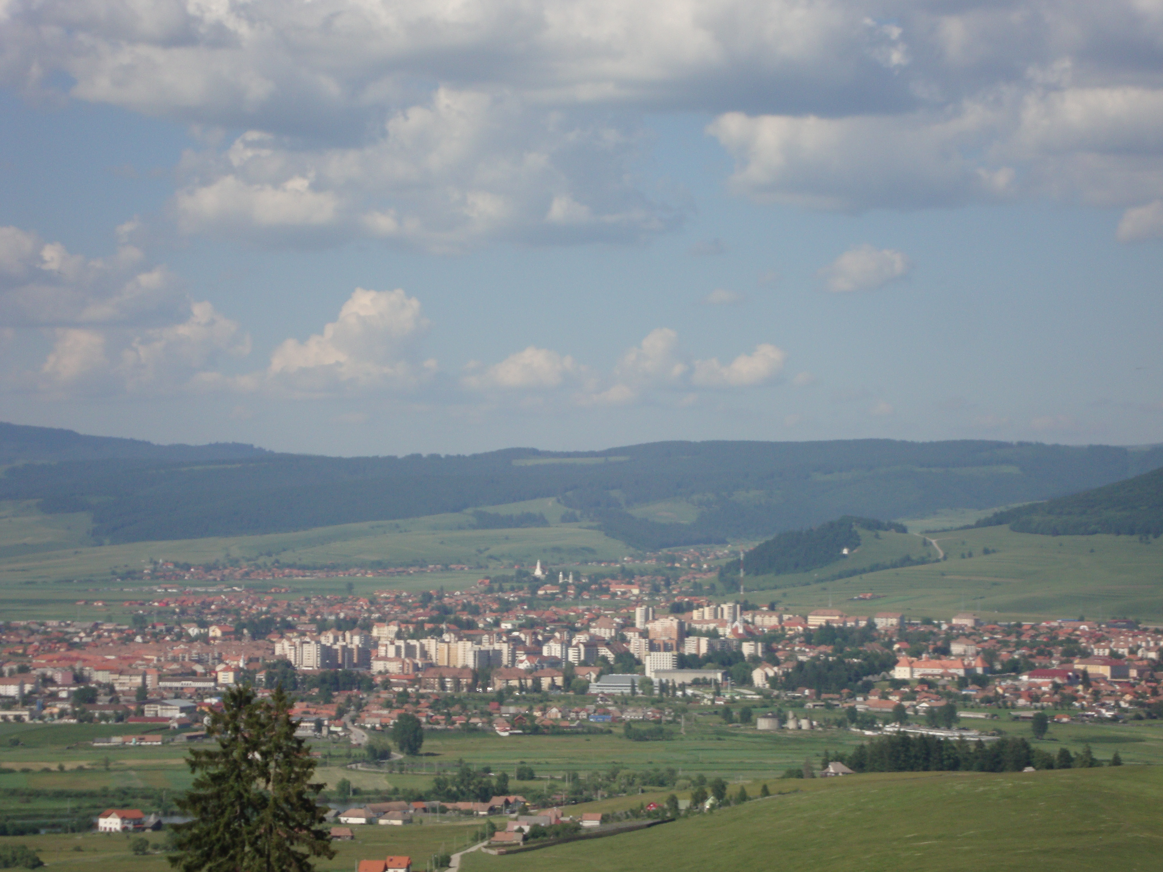 Miercurea Ciuc (în maghiară Csíkszereda, germană Szeklerburg), reședința și cel mai mare oraș al județului Harghita, Transilvania, România.